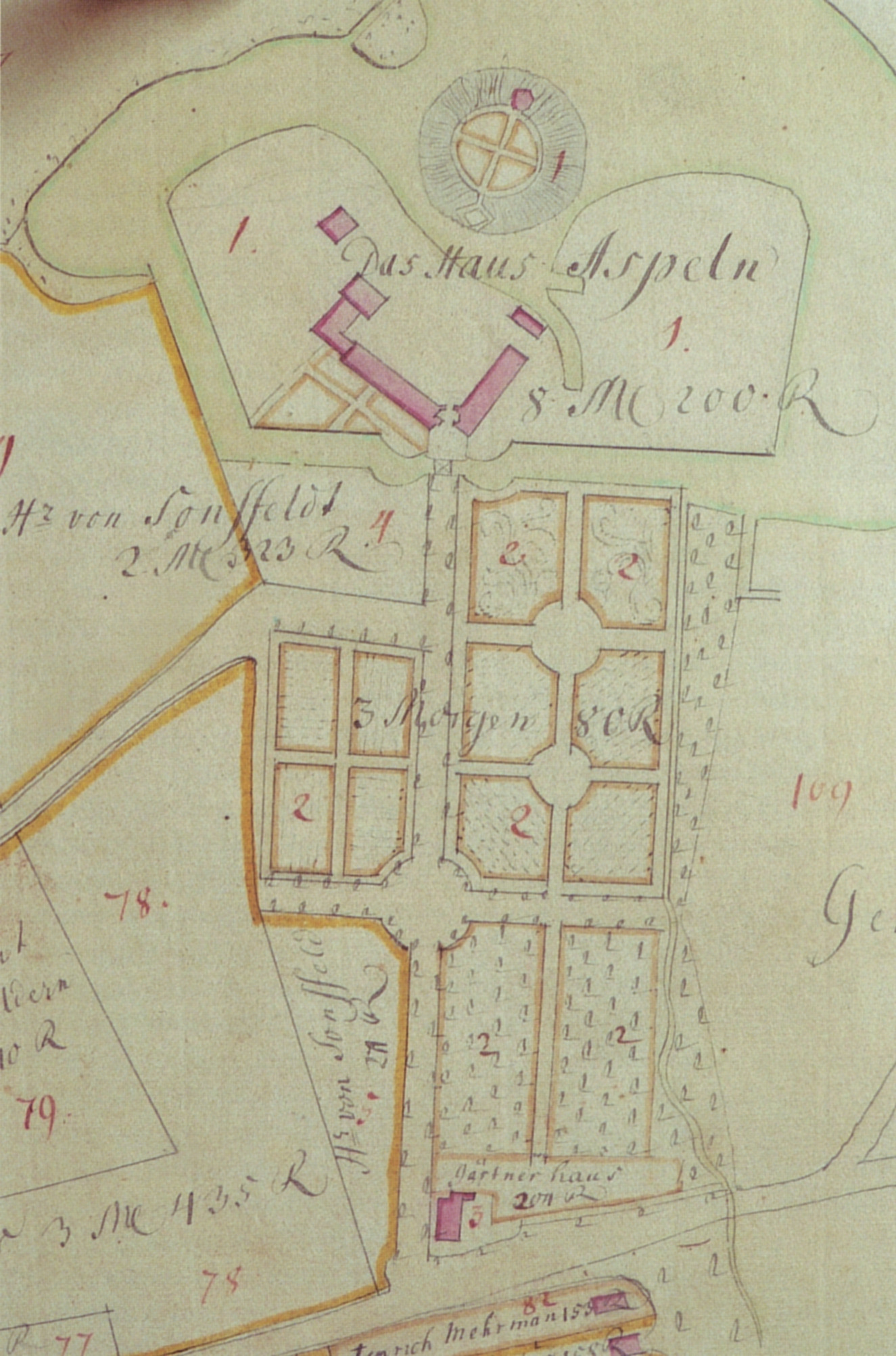 Haus Aspel in Rees-Haldern, Ausschnitt aus einem klevischen Kataster von 1734